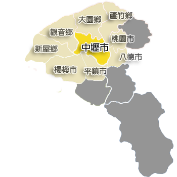 中壢市行政區劃